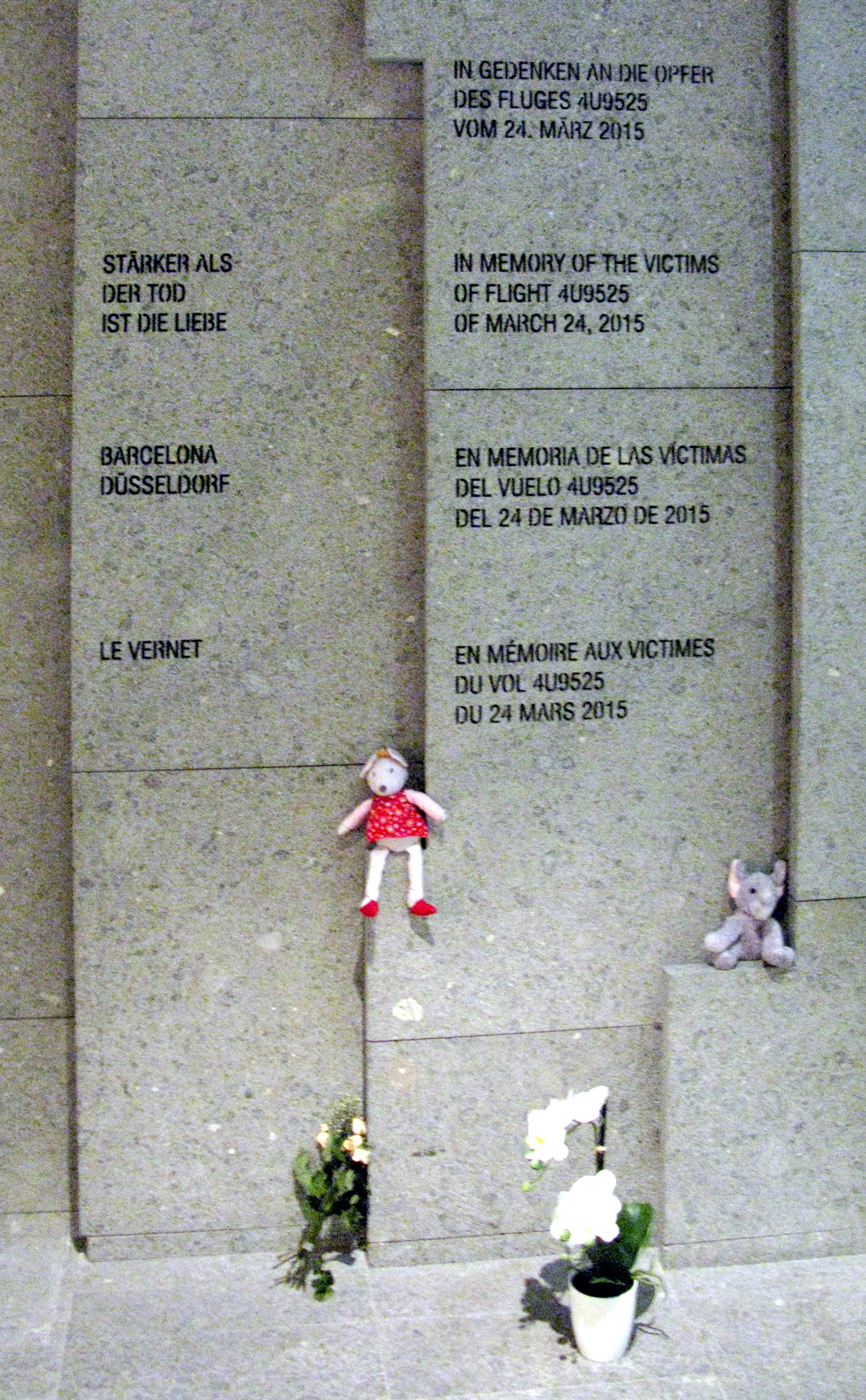 Gedenkraum im Flughafen Düsseldorf, Inschrift zum Flugzeugabsturz des Germanwings-Fluges 9525 im März 2015